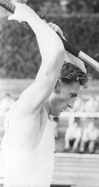 Manfred Preußner Zentralbild Bach 10.09.1960 Olympiateilnehmer Manfred Preußner. Im Stabhochsprung wurde für die gemeinsame deutsche Mannschaft der DDR-Sportler, Manfred Preußner nominiert.